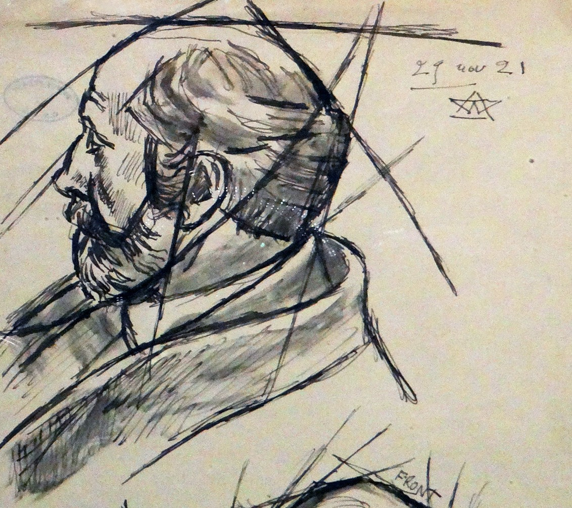 Portrait d'Auguste Perret (détail) par Antoine Bourdelle pour son buste 29/11/1921 Encre et lavis sur papier 31x20 cm Dessin présenté dans l'exposition Auguste Perret, huit chefs-d’œuvre dans la salle hypostyle du palais d'Iéna Site de l'exposition Auguste Perret, huit chefs-d’œuvre!/? Architectures de béton armé Article de Wikipedia sur Auguste Perret